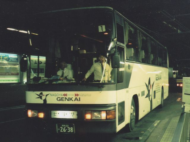 Nishitetsu Bus "GENKAI" Mitsubishi U-MS729SA at Meitetsu Bus Center